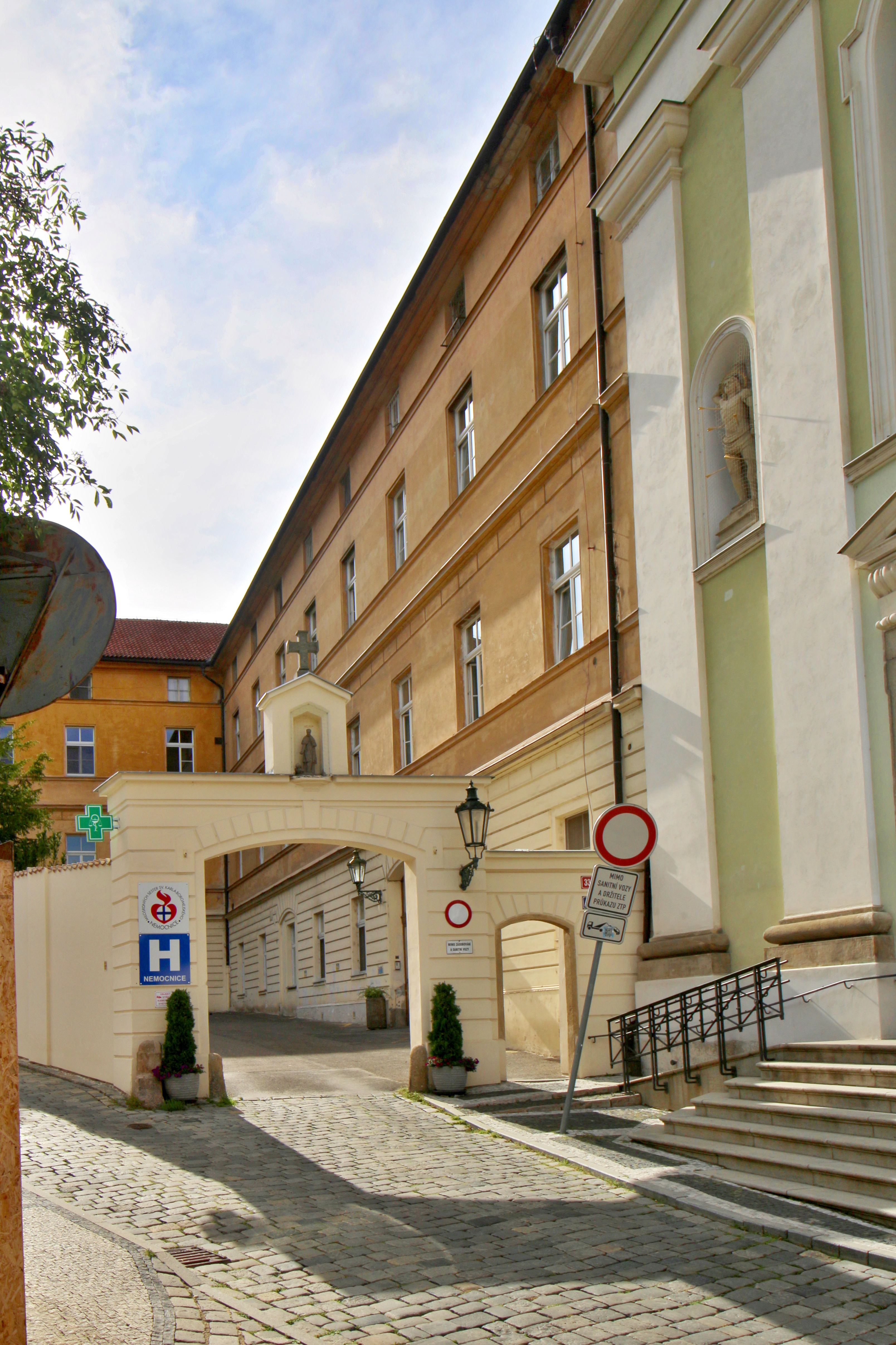 Malá Strana, kongregace Milosrdných sester sv. Karla Boromejského